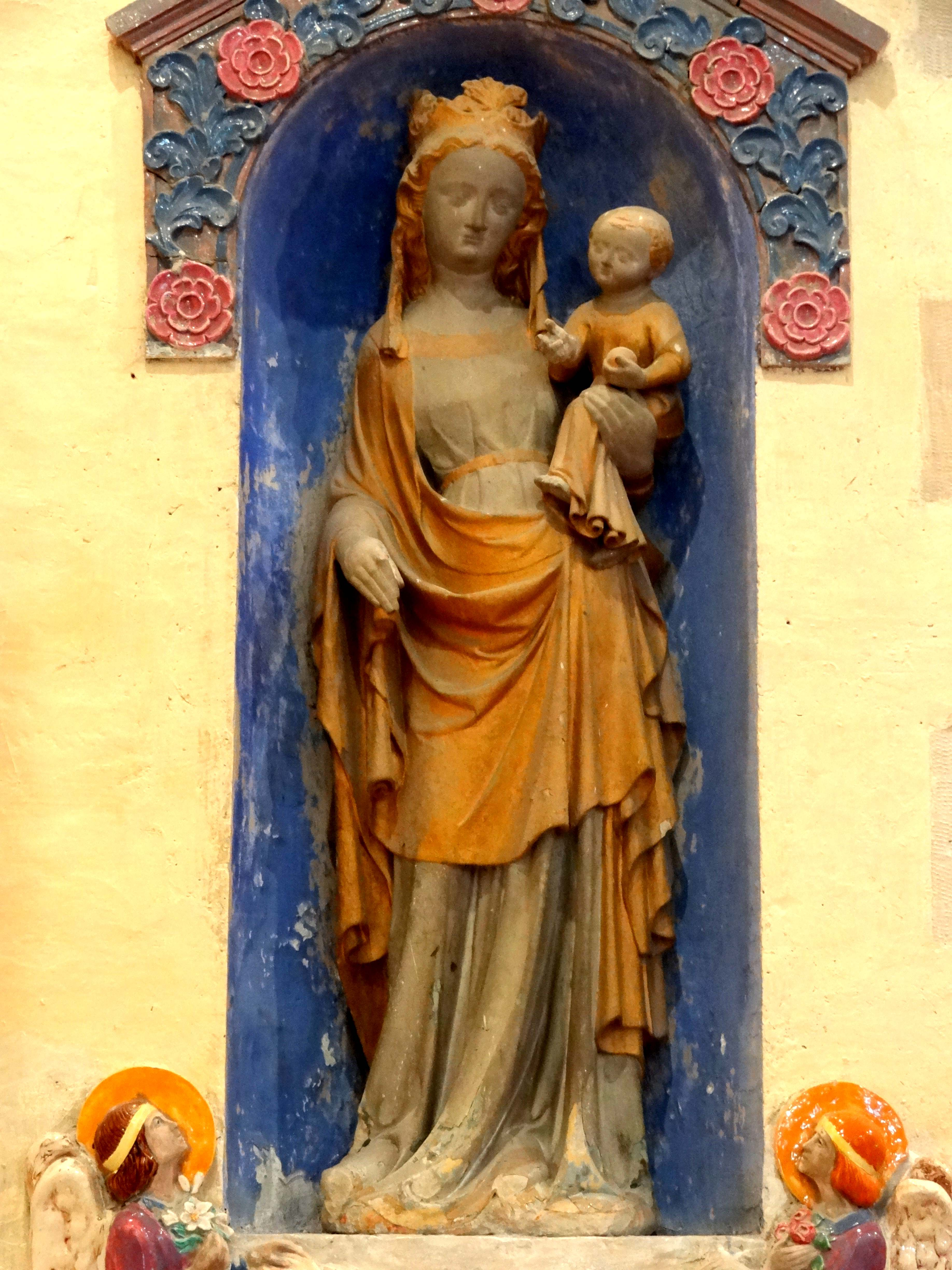 Vierge à l'Enfant, deuxième quart XIVe siècle.